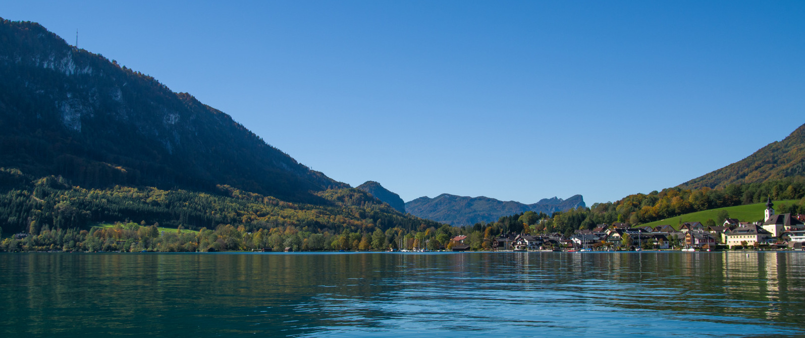 Blick vom Attersee Richtung Mondsee, rechts im Bild Unterach am Attersee, im Hintergrund die Drachenwand